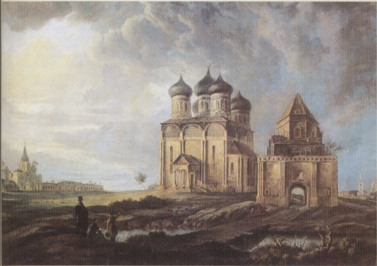 View of the village Izmaylovo Вид села Измайлова